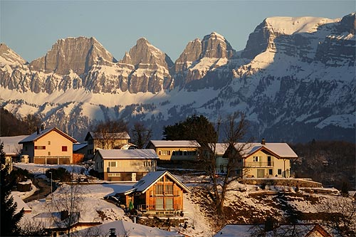 Wangs im Morgenlicht mit Blick auf die Churfirsten